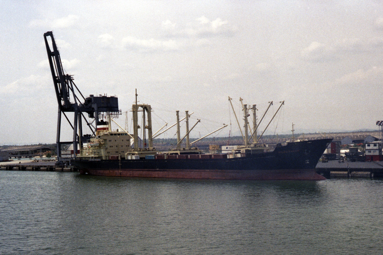 aufgenommen 1981 in Port Kelang